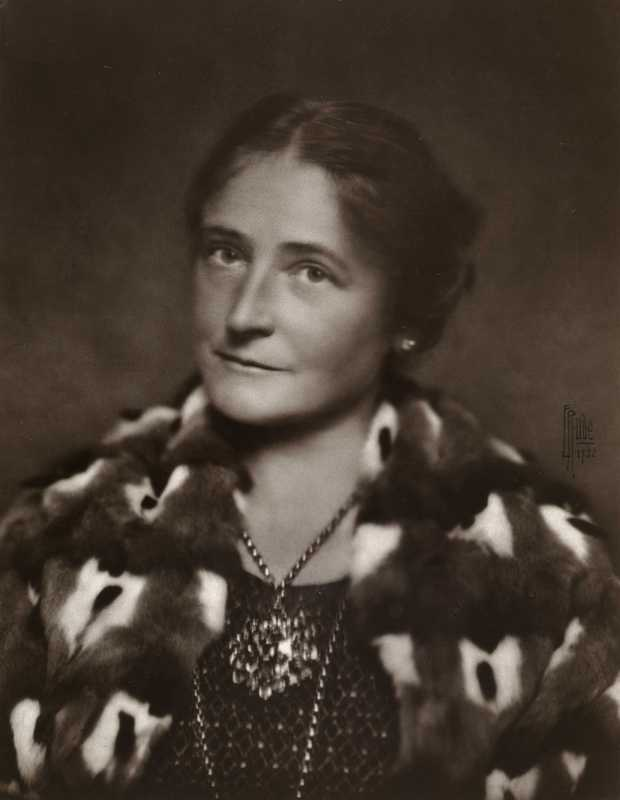 Forfatteren Barbra Ring fotografert av Ernest Rude i 1922.